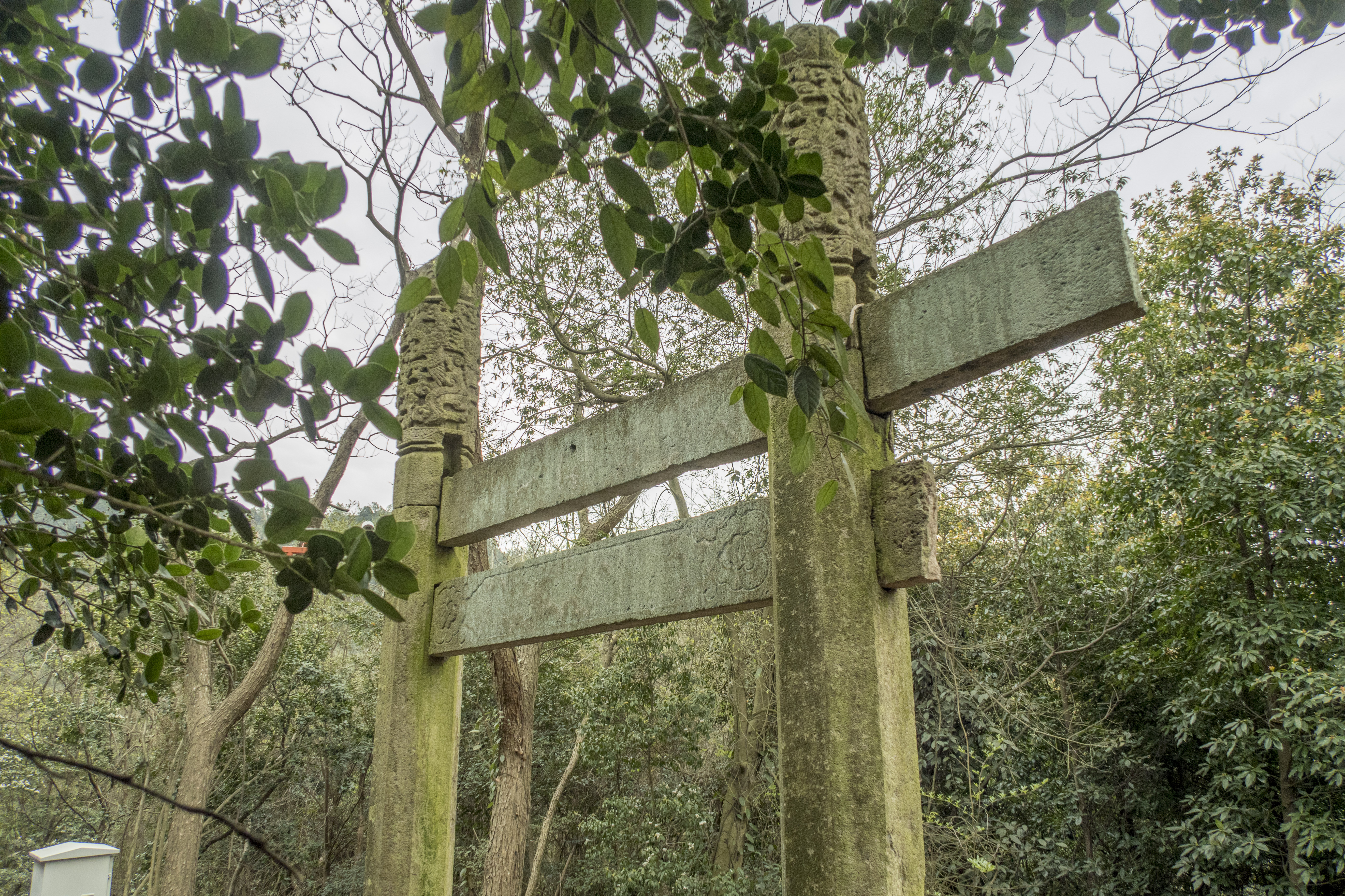 东钱湖墓葬群：金字山石牌坊群